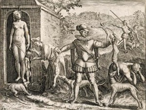 Испанец кормит собак.